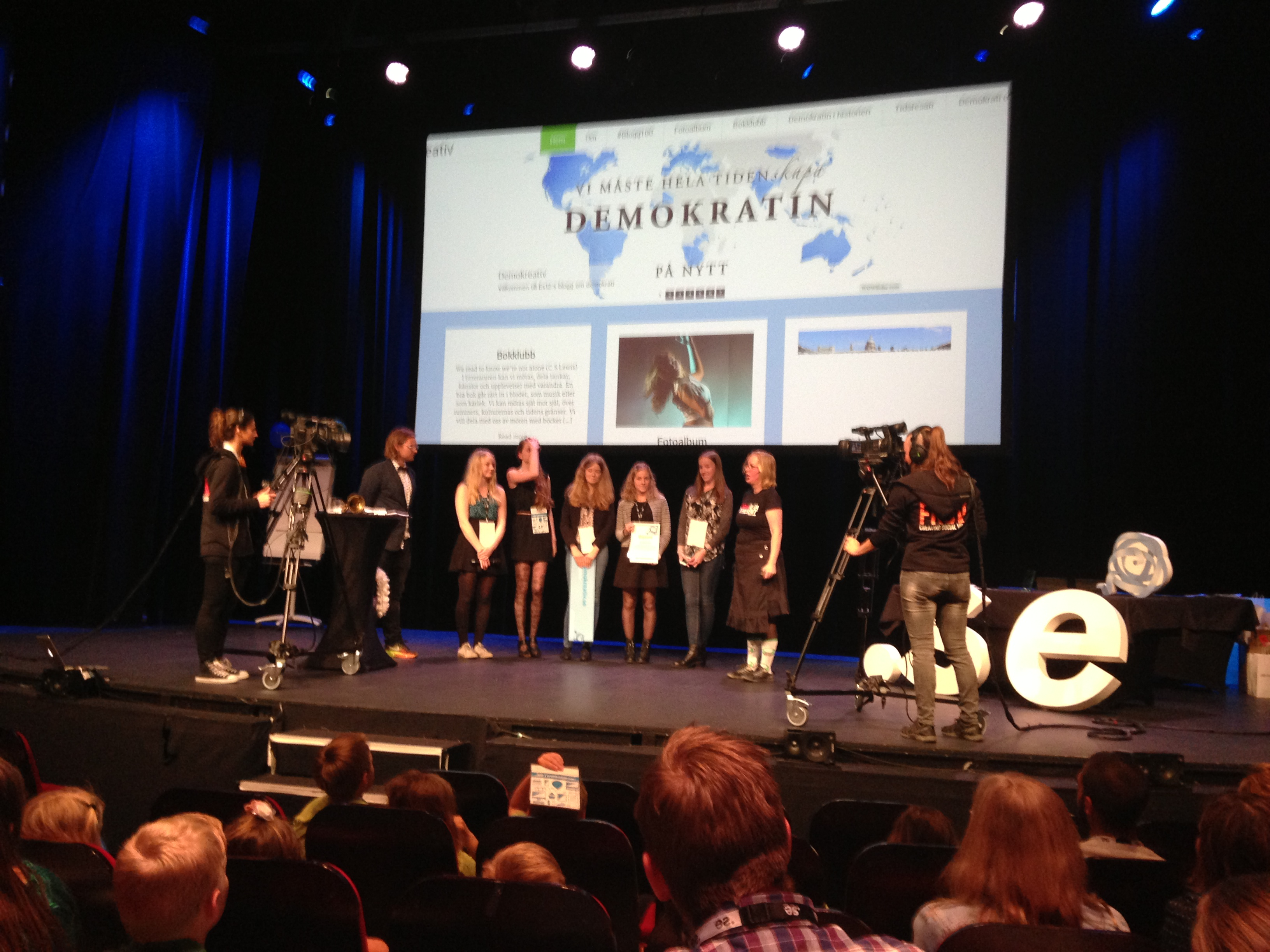 Demokreativ, vinnare i Webbstjärnan 2014